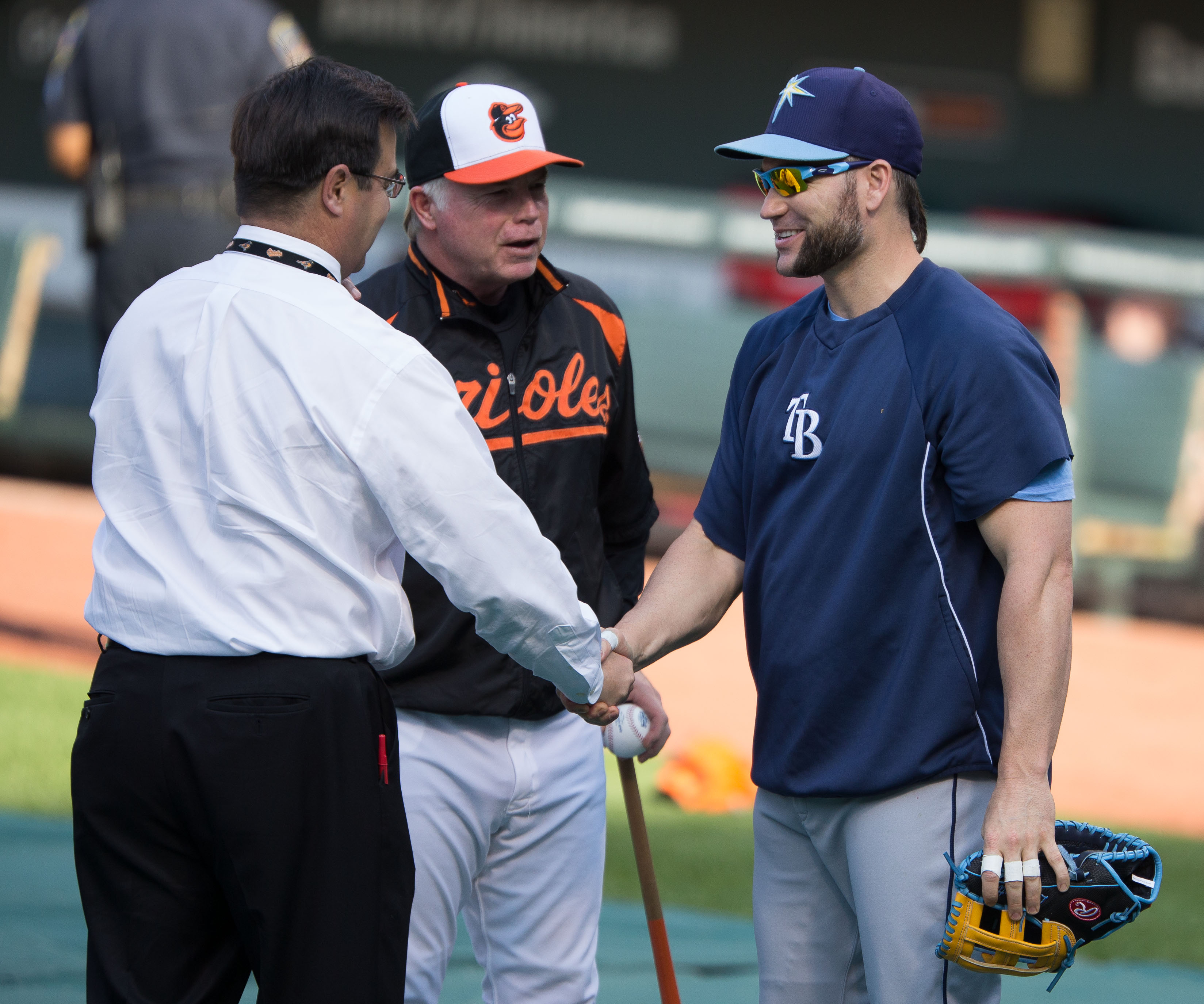 Tampa Bay Rays at Baltimore Orioles May 17, 2013